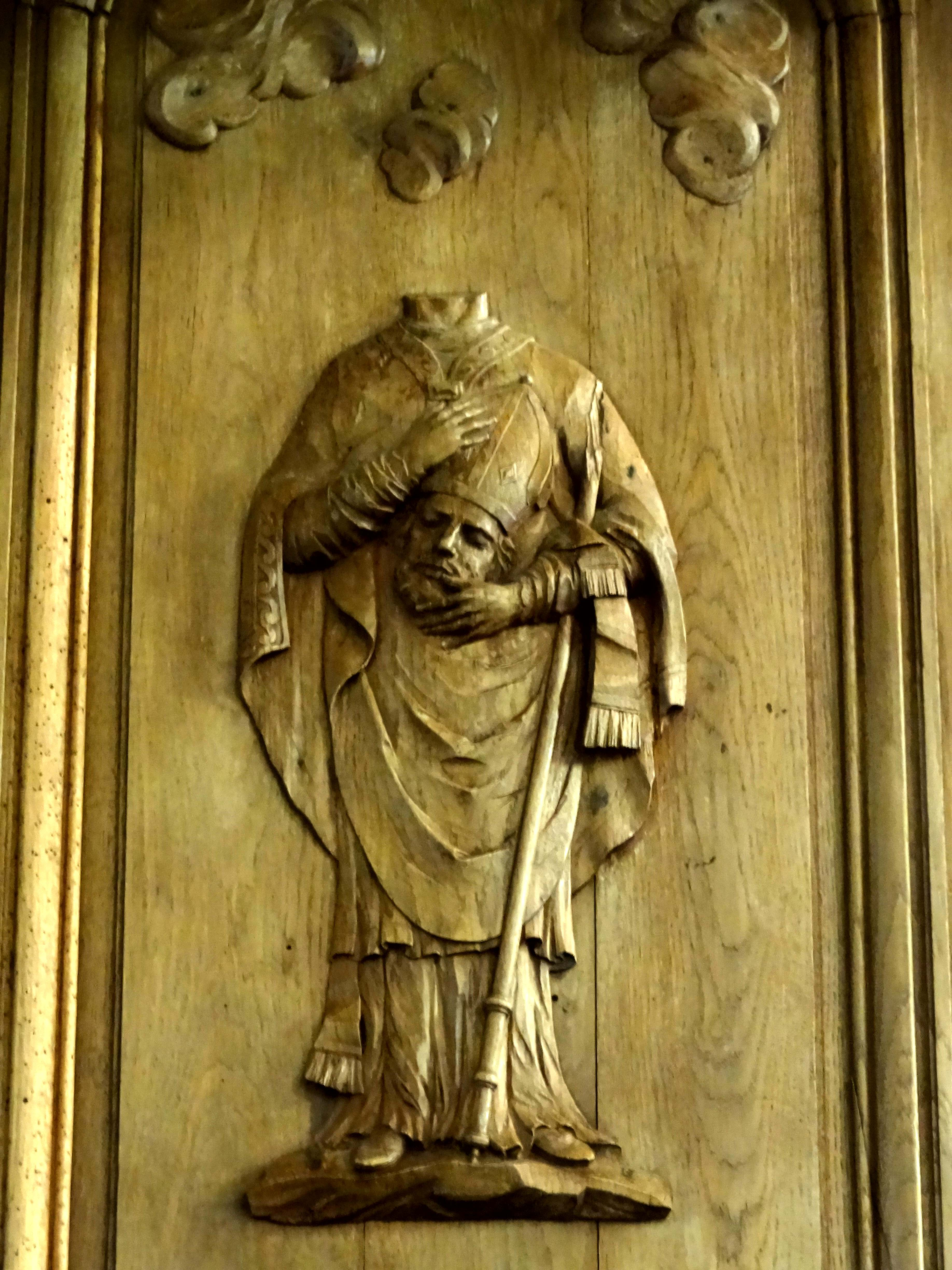 Mobilier de l'église - voir titre.